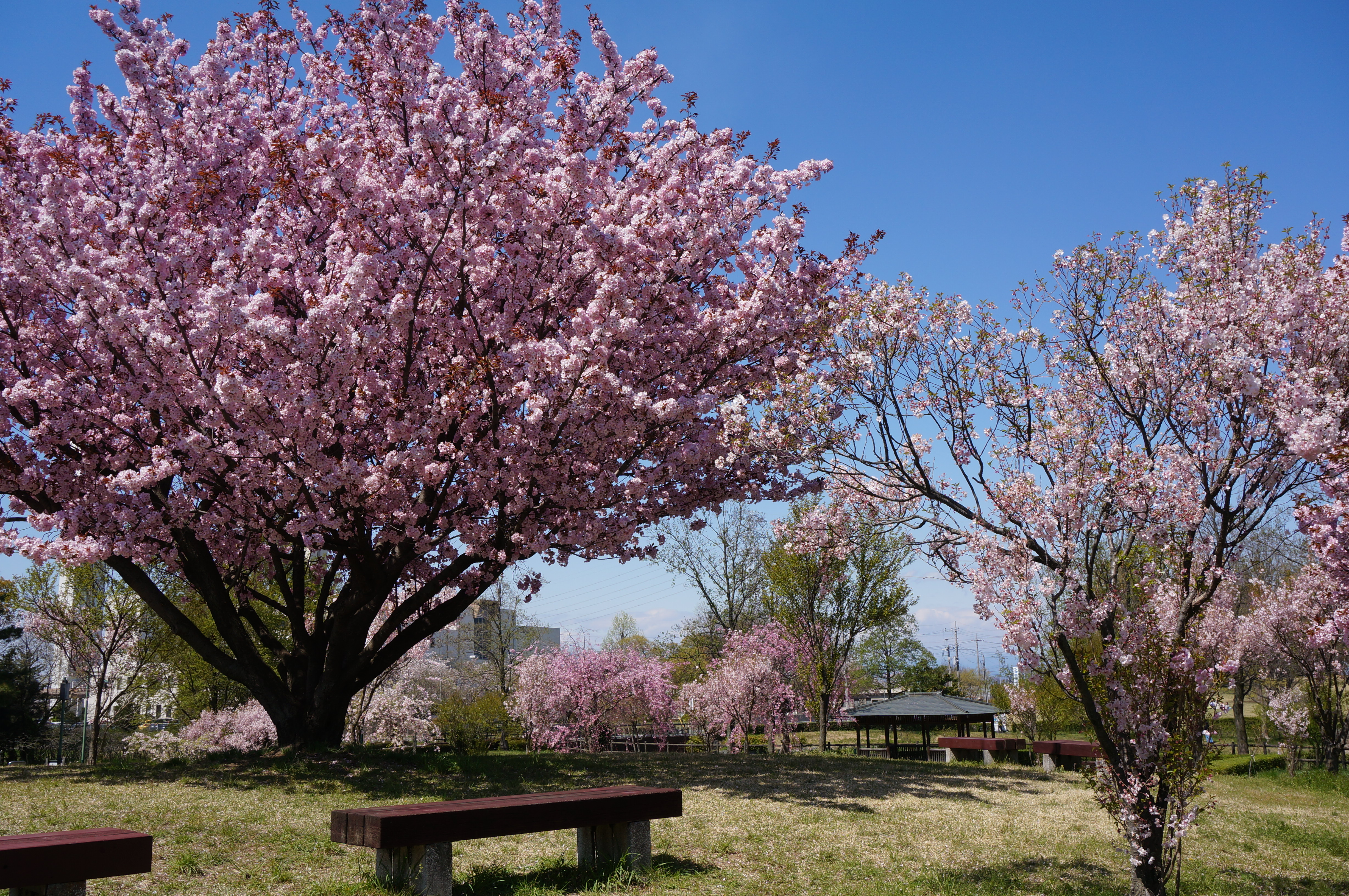 兼六園熊谷と熊谷